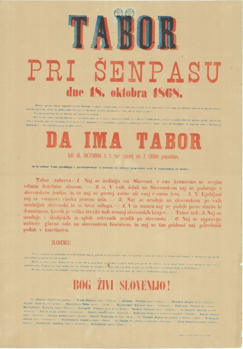 Plakat za tabor pri Šenpasu dne 18. oktobra 1868.